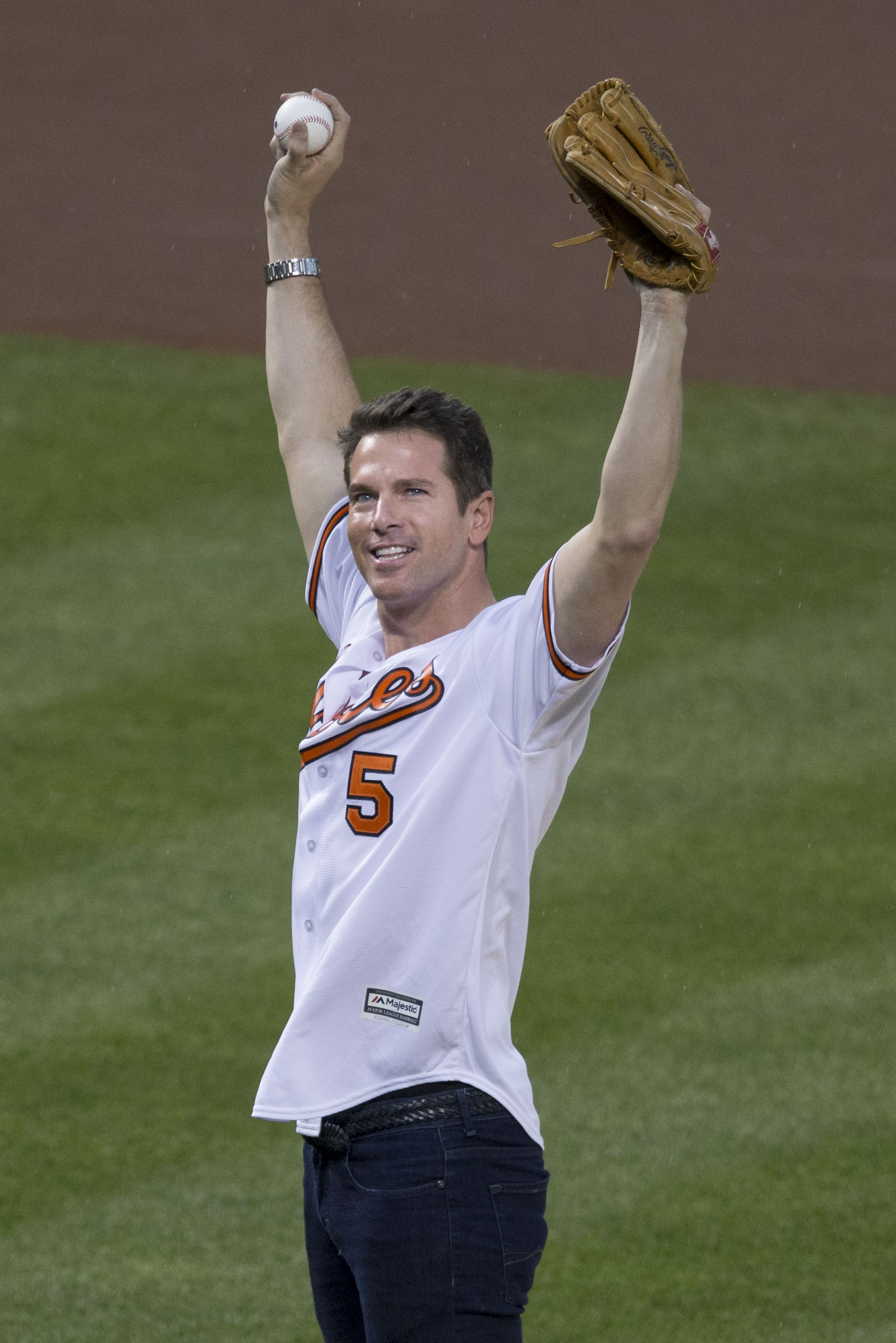 Phillies at Orioles 6/15/15